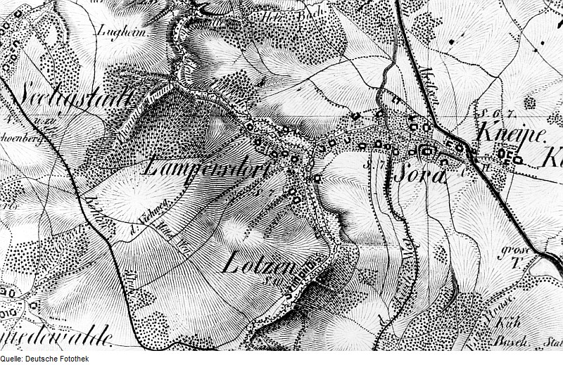 Original image description from the Deutsche Fotothek Klipphausen-Lampersdorf. Oberreit, Sect. Dresden, 1821/22